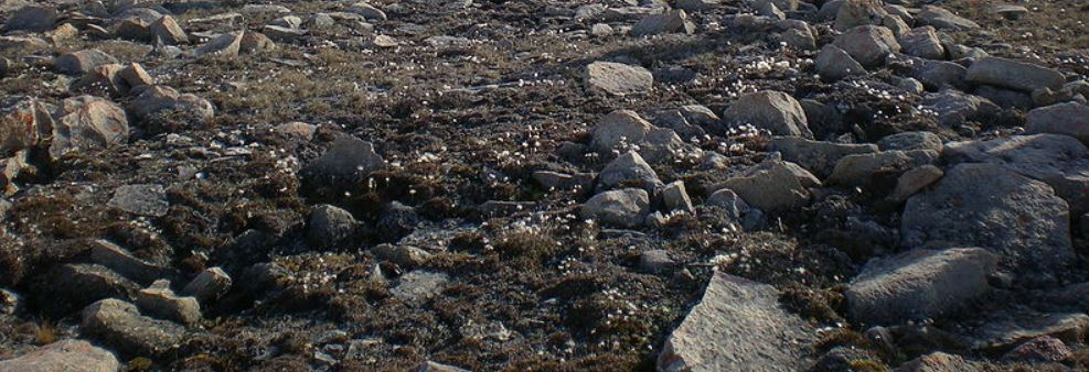 Structure mégalithique dorsétienne de type "maison longue", découverte fortuitement à proximité de la baie de Cambridge, au sein du territoire canadien du Nunavut.